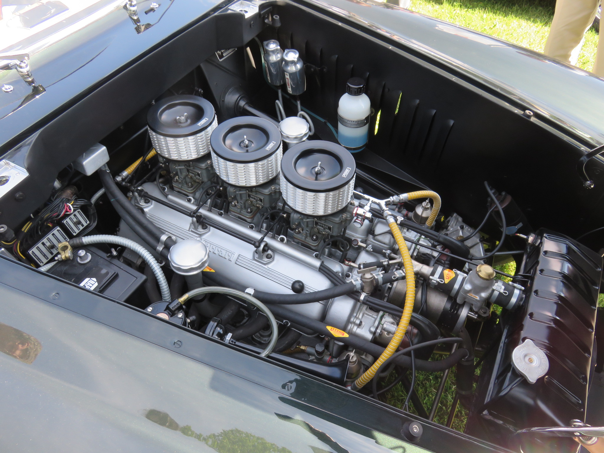 Ferrari 250 Europa, 12 cylindres, 2953 cc, carrosserie Vignale, 1954, concours d'élégance Villa d'Este 2015